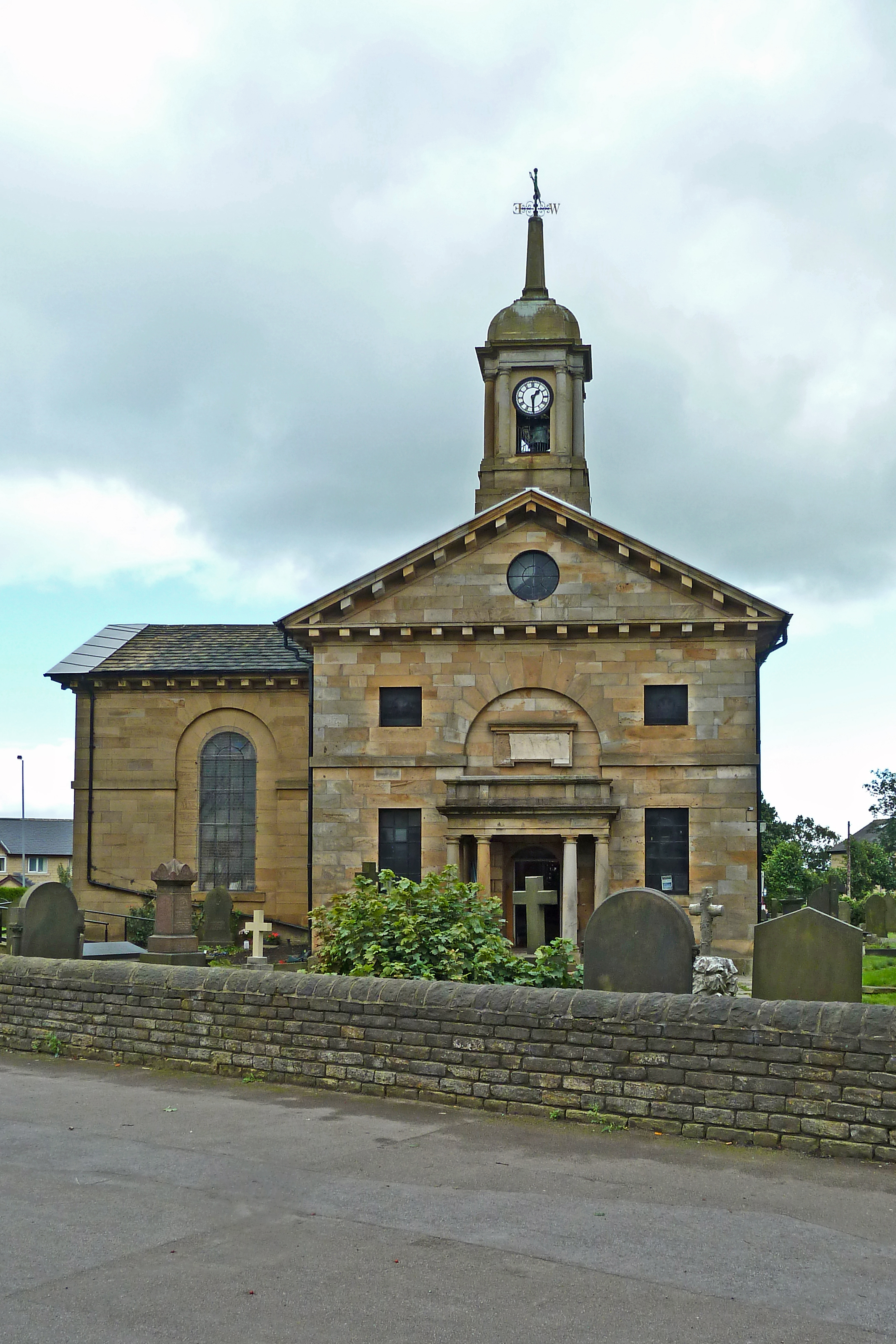 St John the Evangelist, Bierley